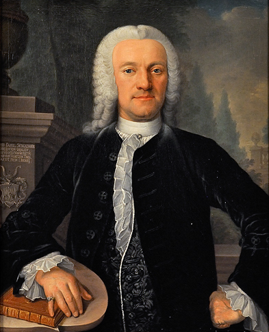 Bildnis des Johann Christian Senckenberg